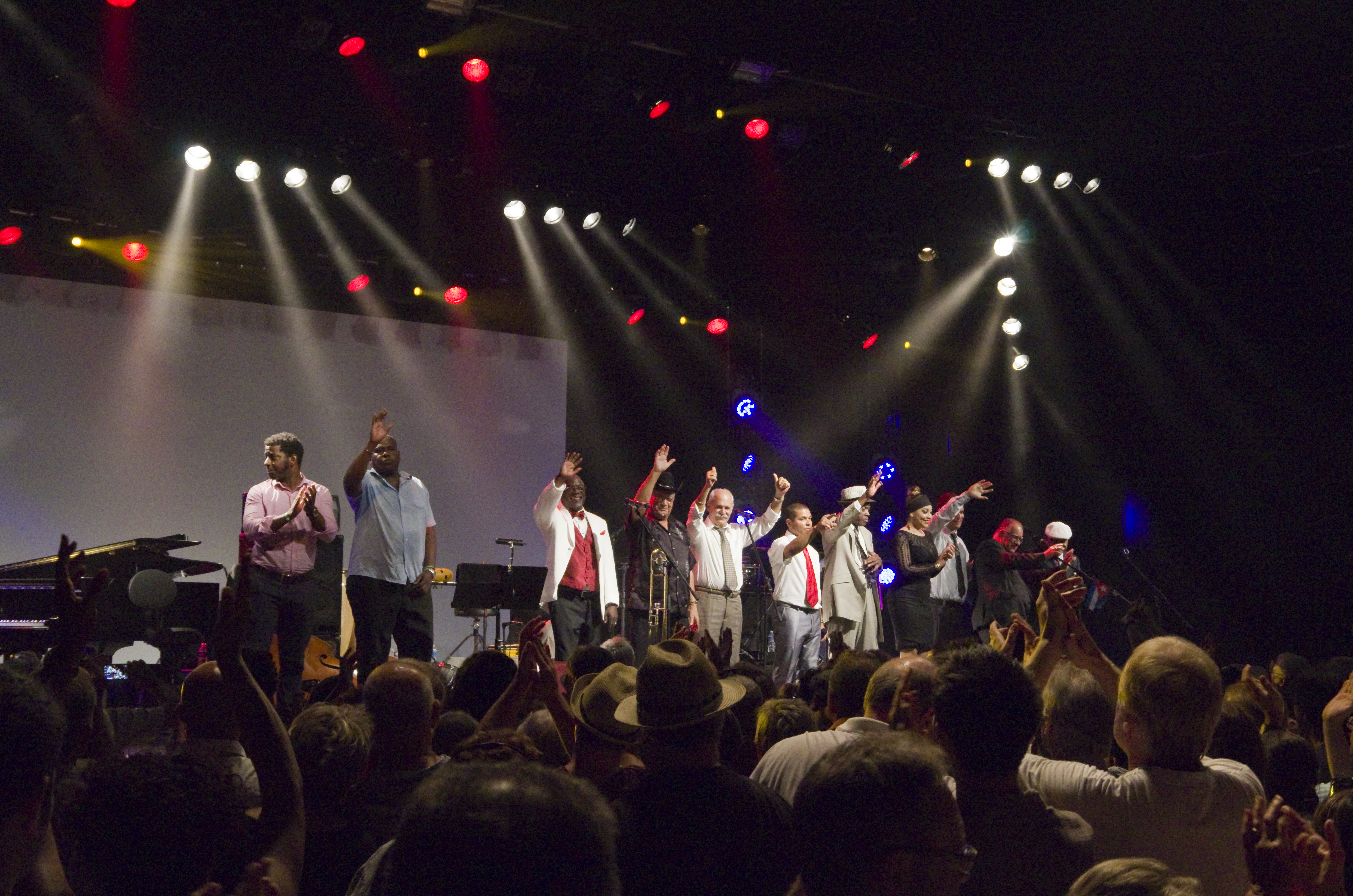 Das Zelt-Musik-Festival 2015 in Freiburg im Breisgau. 06.07.2015 Orquesta Buena Vista Social Club